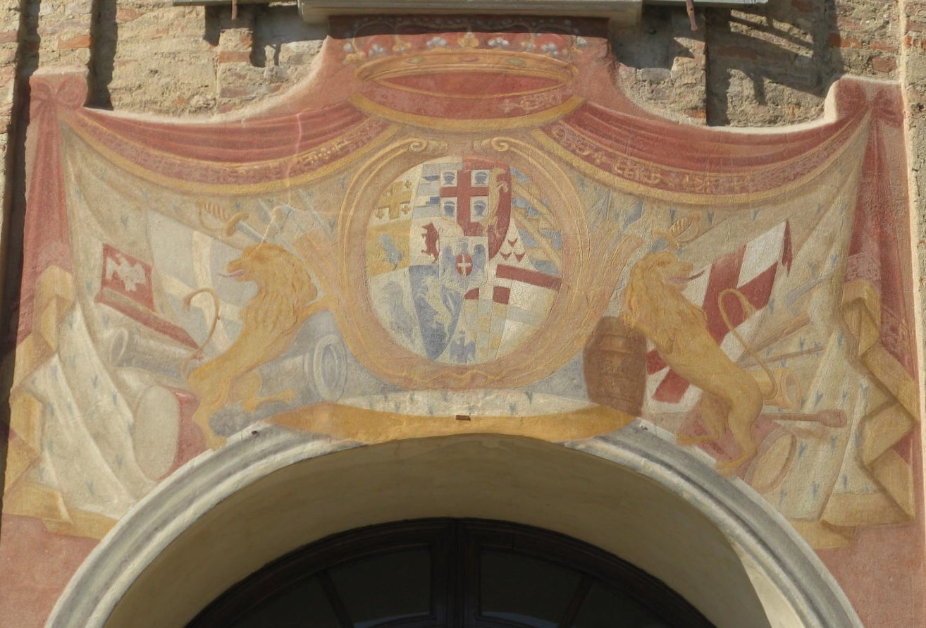 Stemma sabaudo sul Palazzo Comunale di Bra This is a photo of a monument which is part of cultural heritage of Italy.